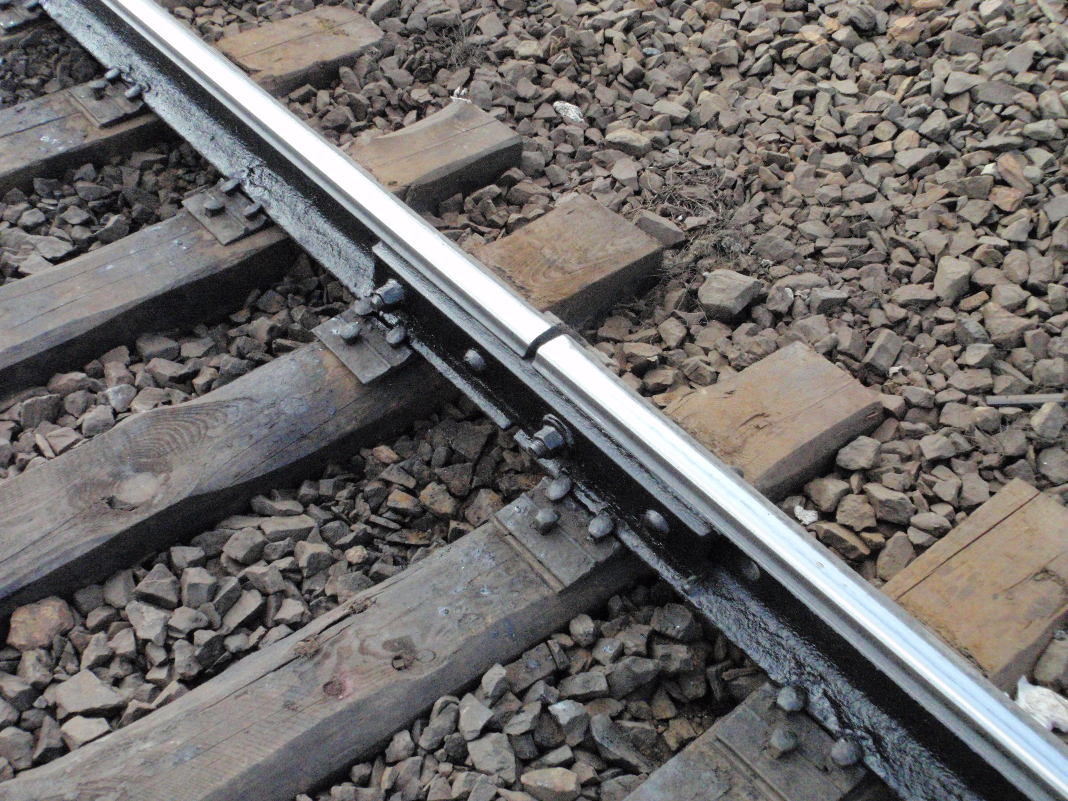 Стик рейок на станції Бескид Львівської залізниці